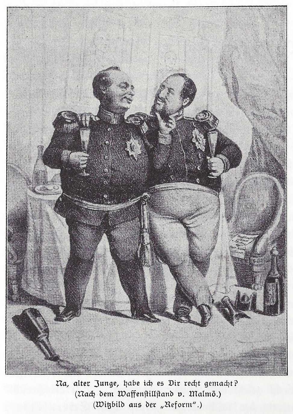 Karikatur auf den Friede von Malmö (1848): Friedrich Wilhelm IV. krault Friedrich VII. (Dänemark) den Bart, weil er als Preußenkönig in Malmö trotz militärisch günstiger Ausgangslage zu Land auf britischen Druck allen dänischen Forderungen nachgegeben hat. In der deutschen Öffentlichkeit wurde das als Schmach empfunden. Die Karikatur überspitzt das Nachgeben des Preußenkönigs gegenüber dem dänischen König (Martin Rackwitz).